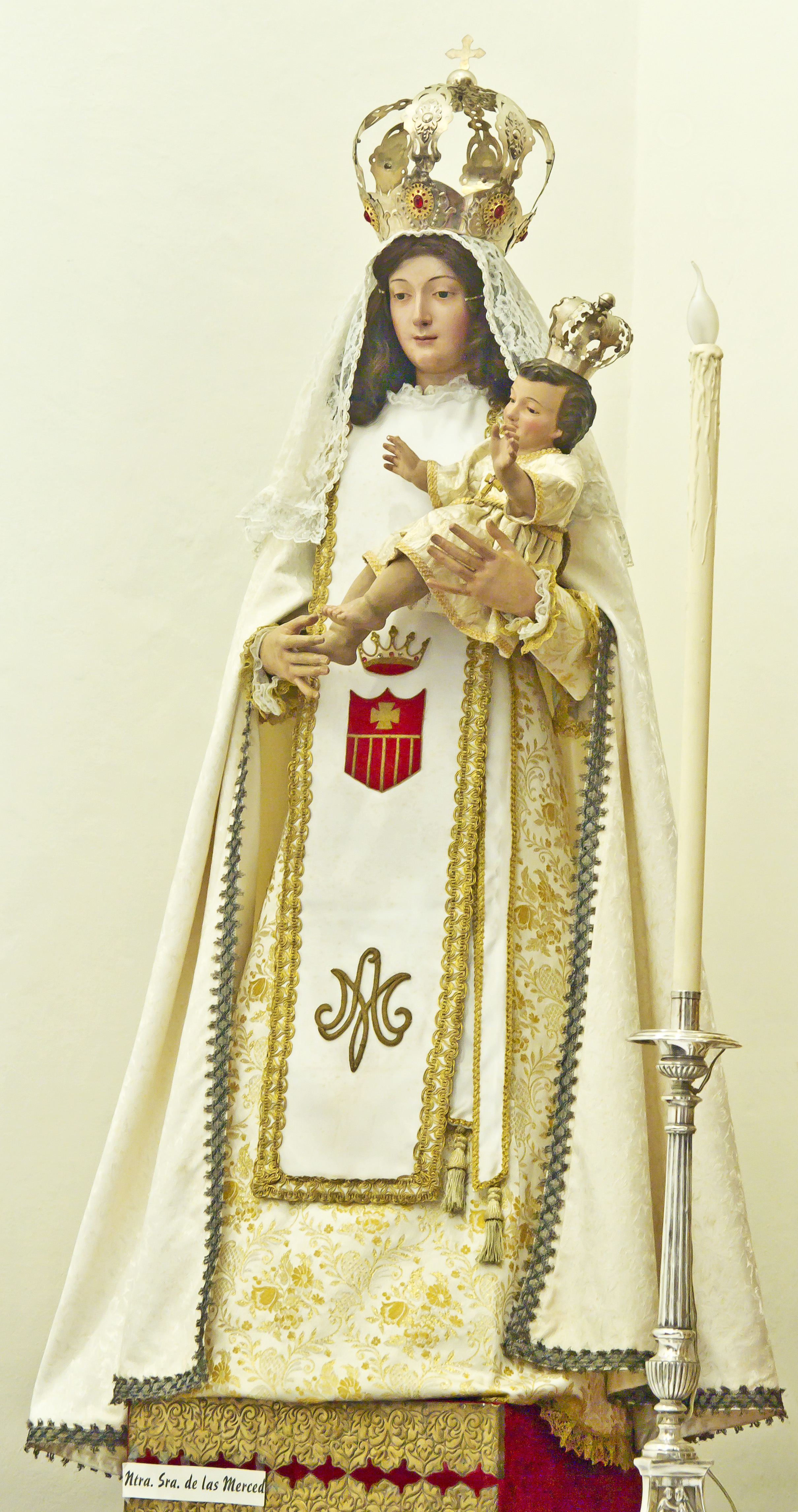 Nuestra Señora de las Merced en el Baptisterio de la Catedral de La Laguna